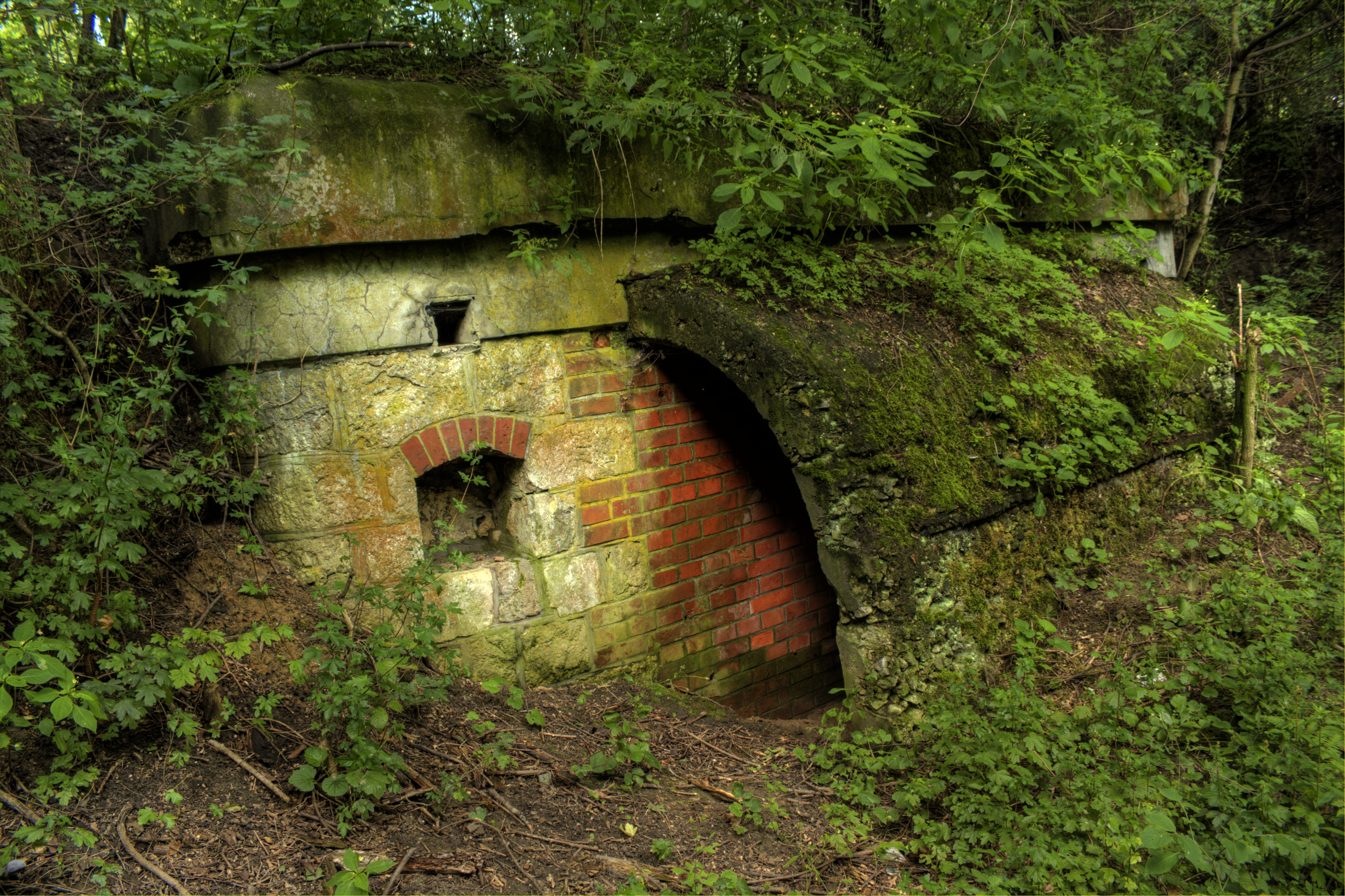 Bateria B-44-5 - wejście do schronu pogotowia, Twierdza Kraków